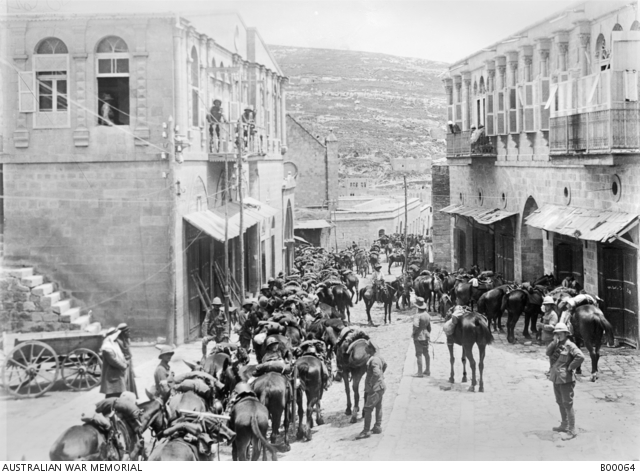 חיילים בריטים בא-סאלט